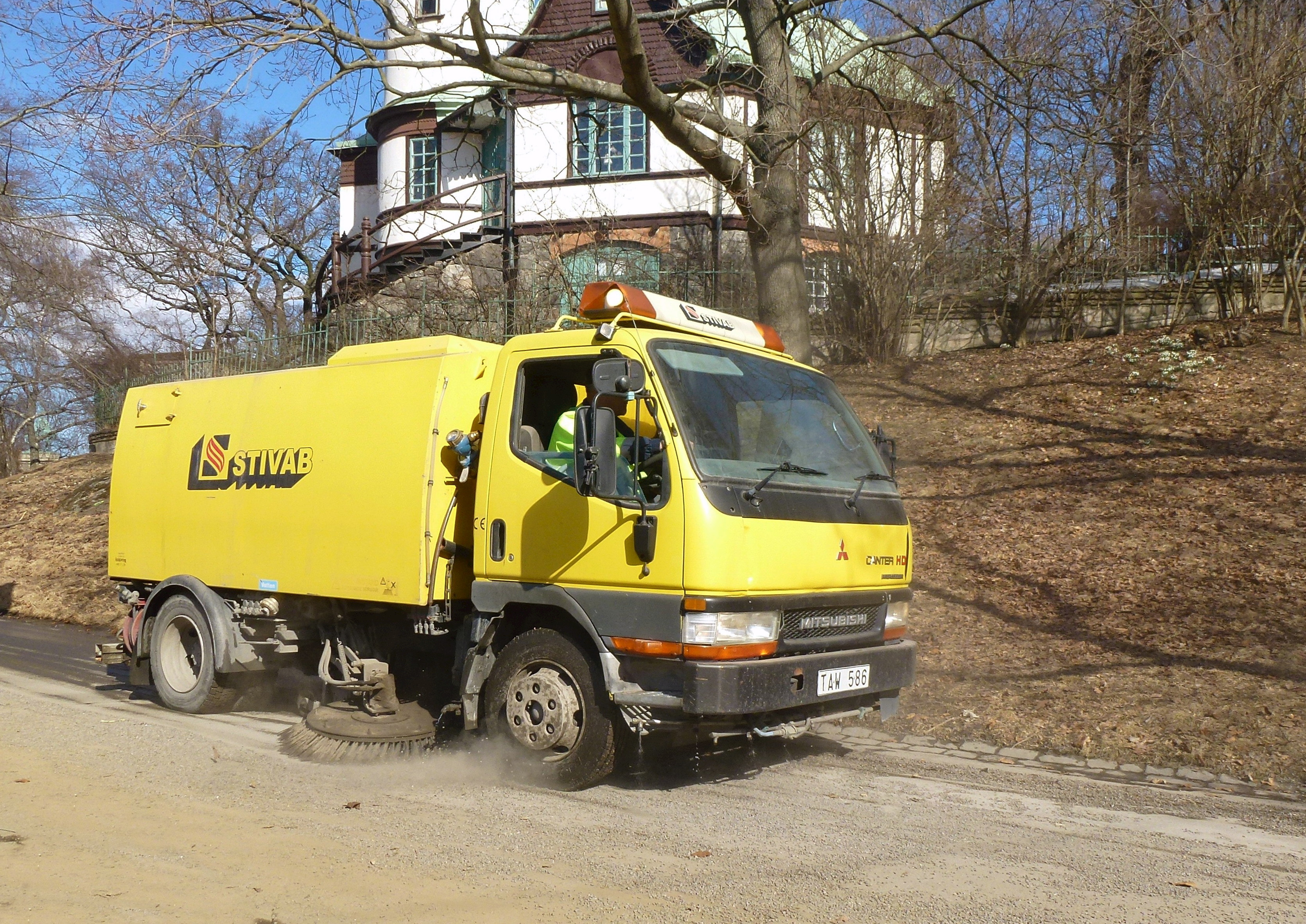 Sandupptagning på Djurgårdsvägen 2013